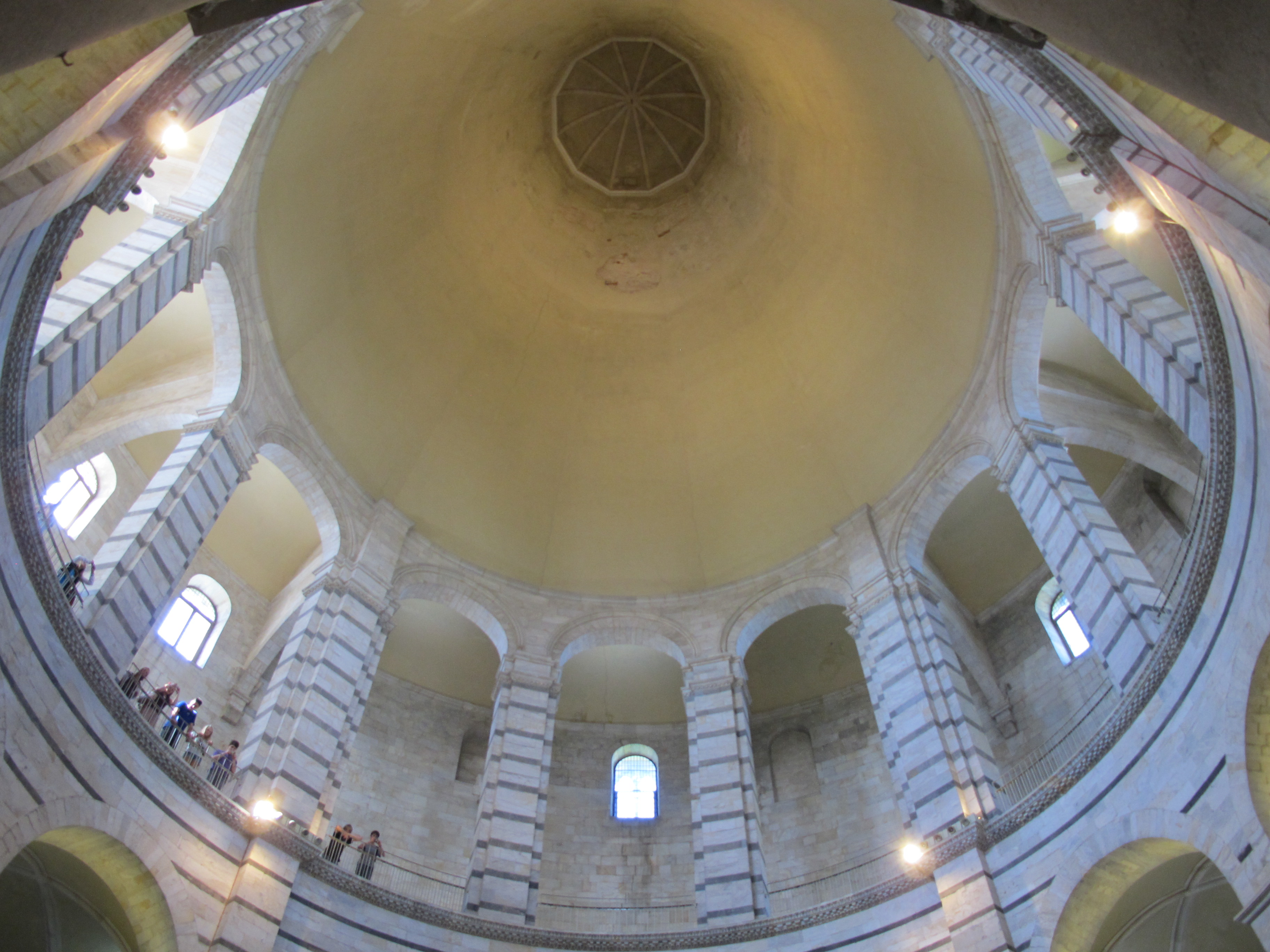 pisa, il battistero